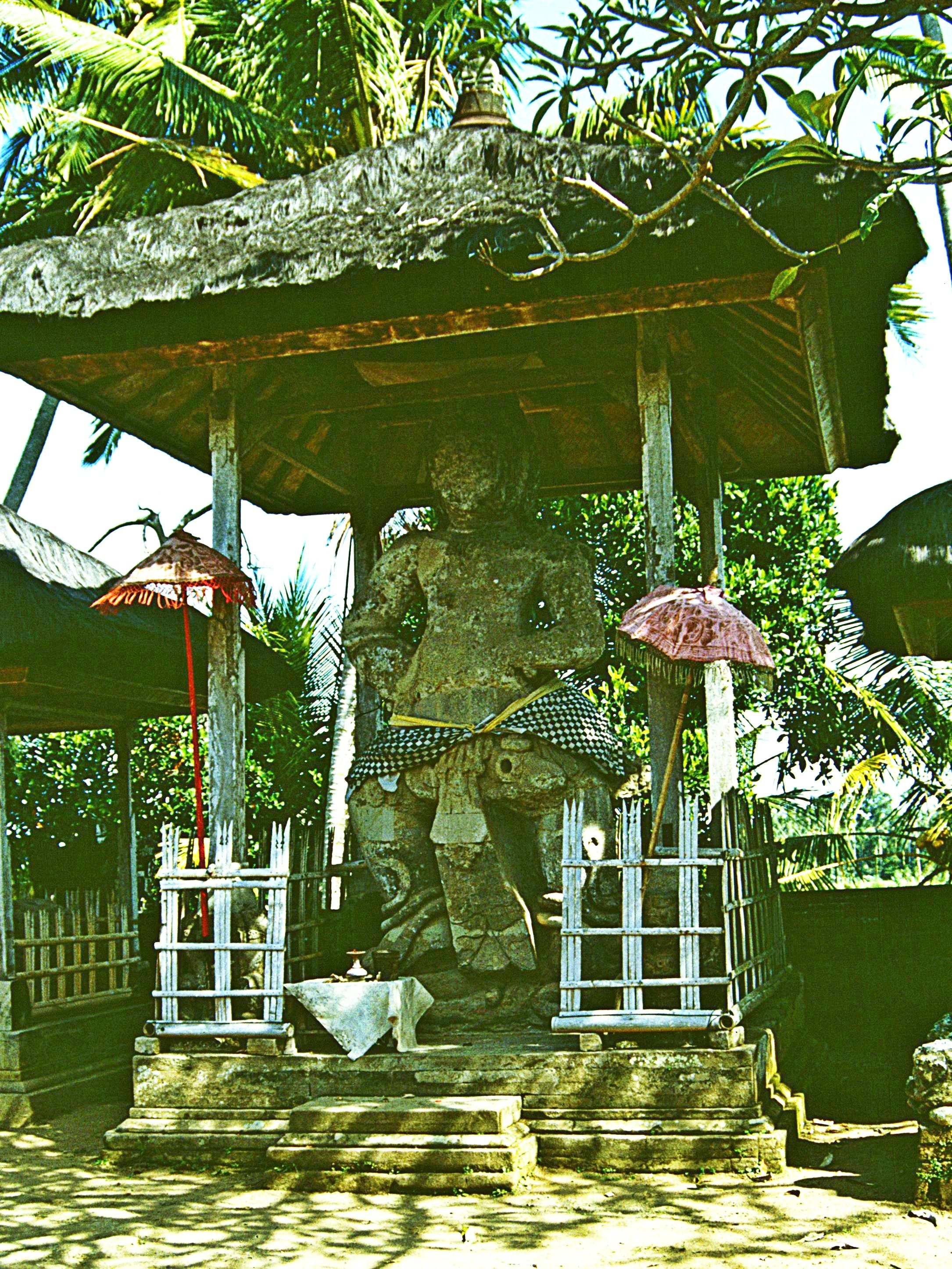 Pura Kebo Edan in Pejebg